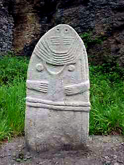 Statue-menhir dit « la Dame de Saint-Sernin », découverte en 1888 a Saint-Sernin-sur-Rance, et aujourd'hui conservée au musée Fenaille de Rodez (Aveyron).